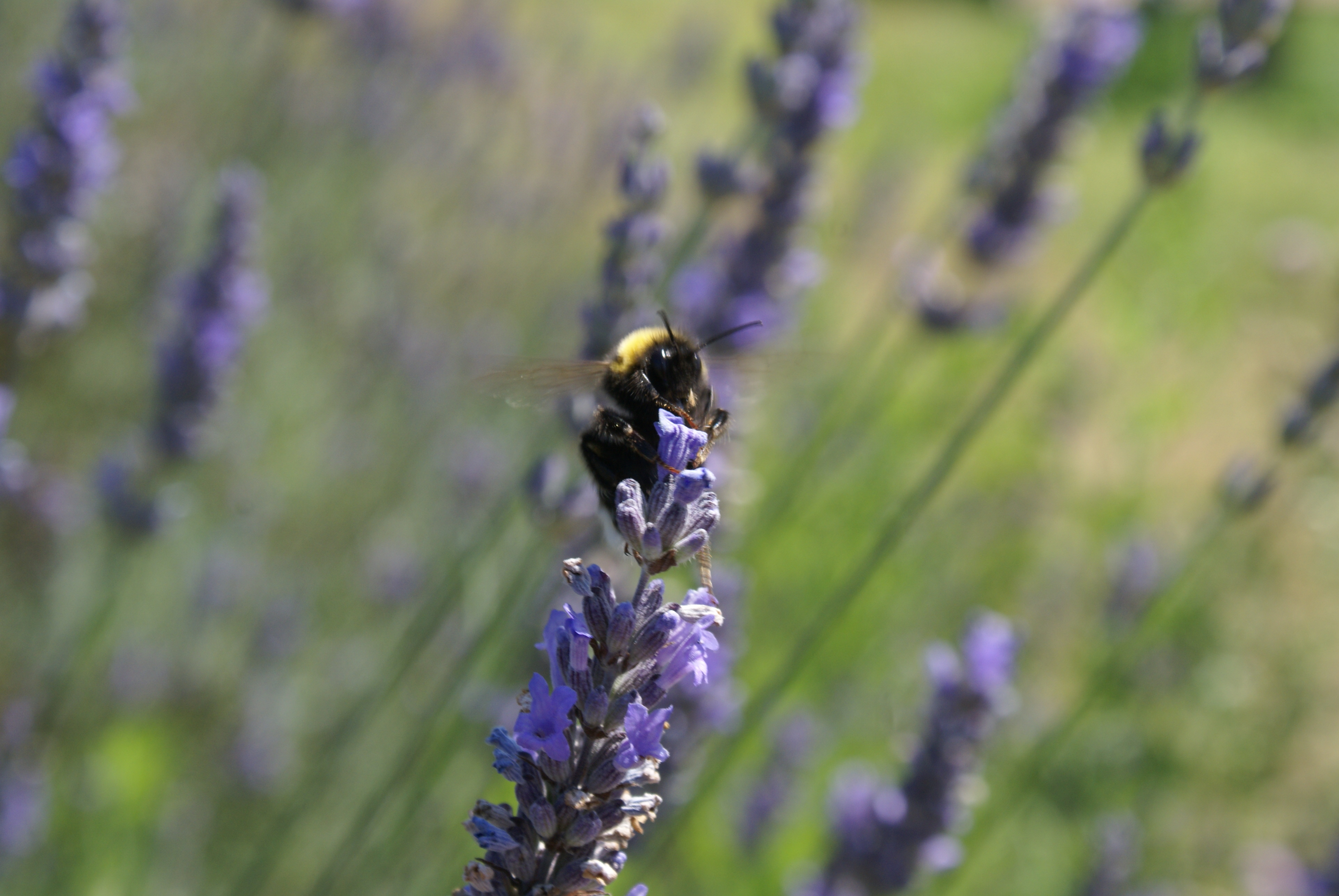 Gewone aardhommel op lavendel